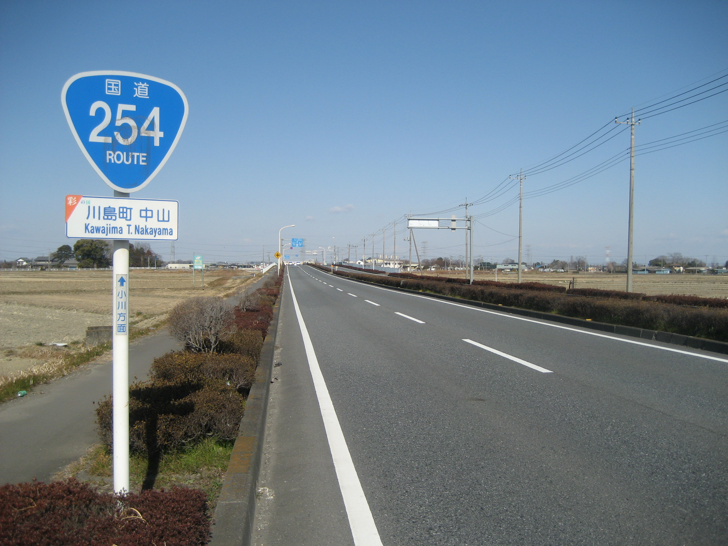 国道254号線川島バイパス（埼玉県比企郡川島町中山付近・東松山方面を撮影）